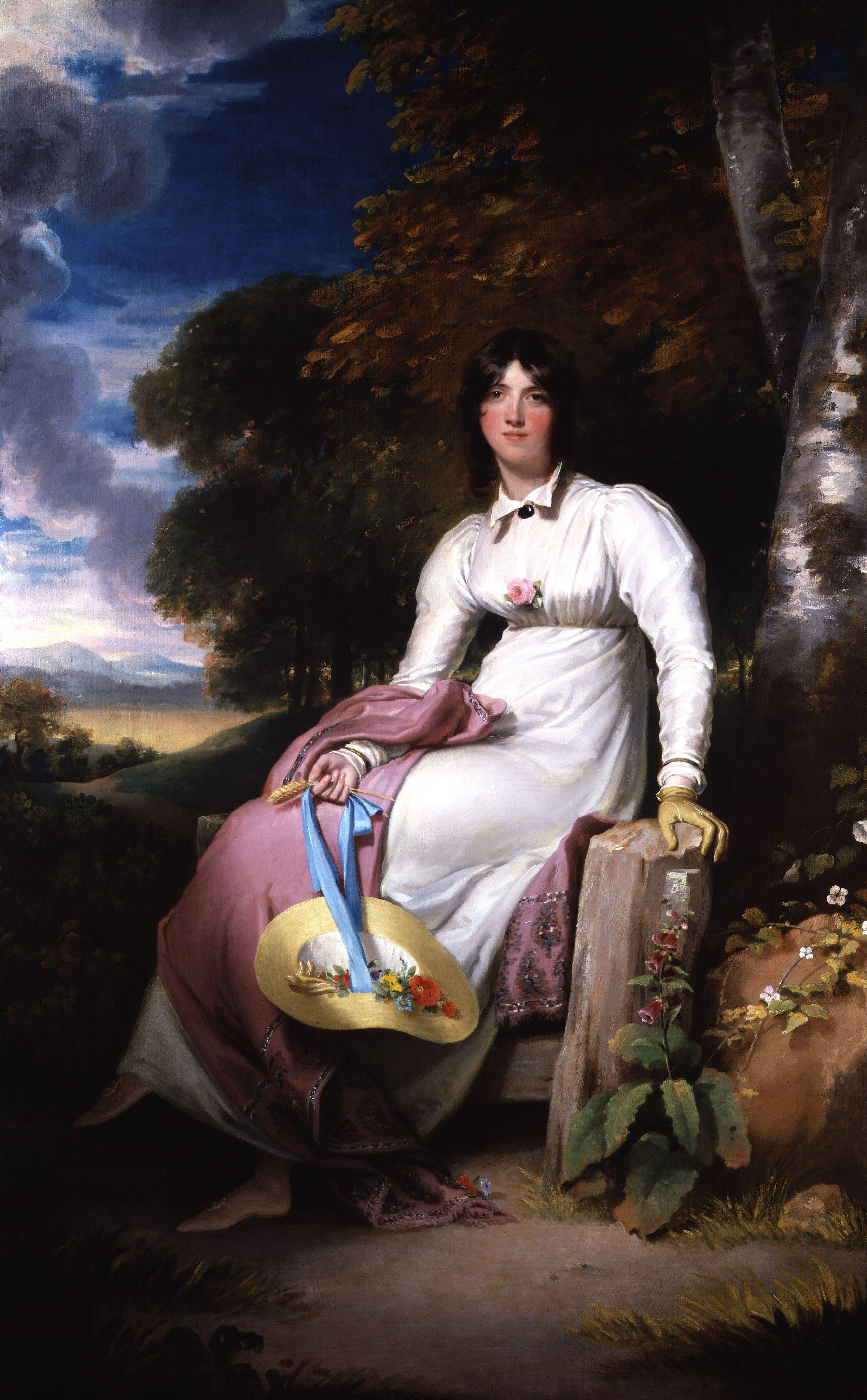 Sophia, Lady Burdett (1775-1844), wife of Sir Francis Burdett